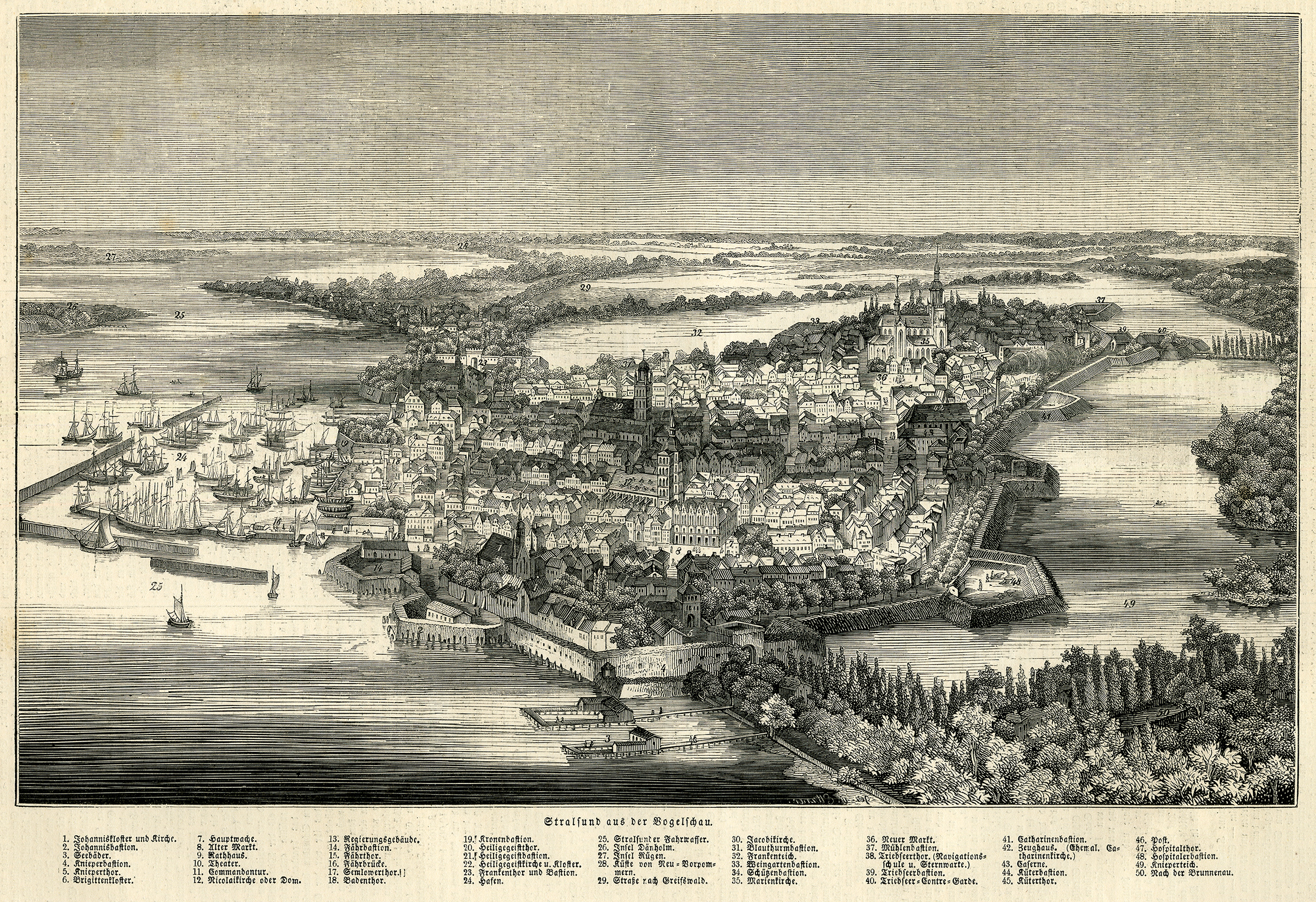 Stralsund, 1851 (Vogelschauplan)